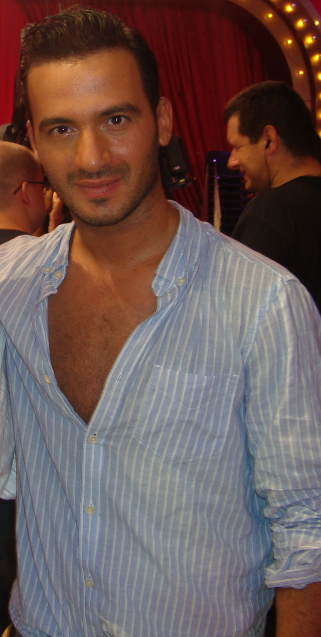 Włoski tancerz Stefano Terrazzino w 2011 roku.